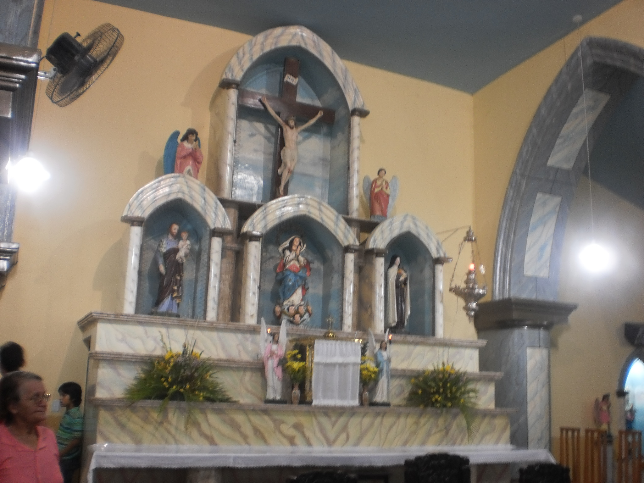 Altar da Igreja Matriz de Pau dos Ferros.